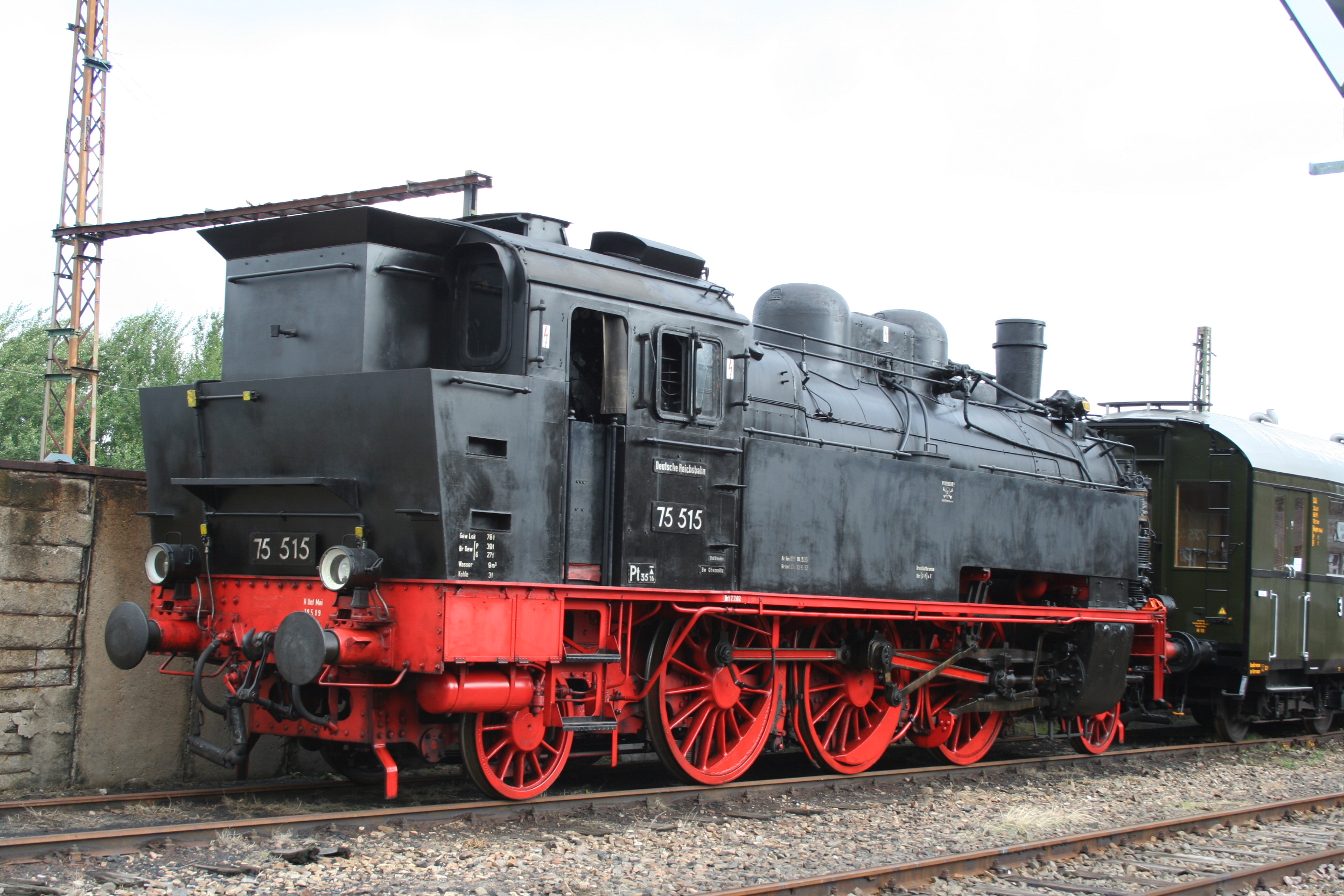 Dampflokomotive 75 515 im Sächsischen Eisenbahnmuseum Chemnitz-Hilbersdorf 23.08.06